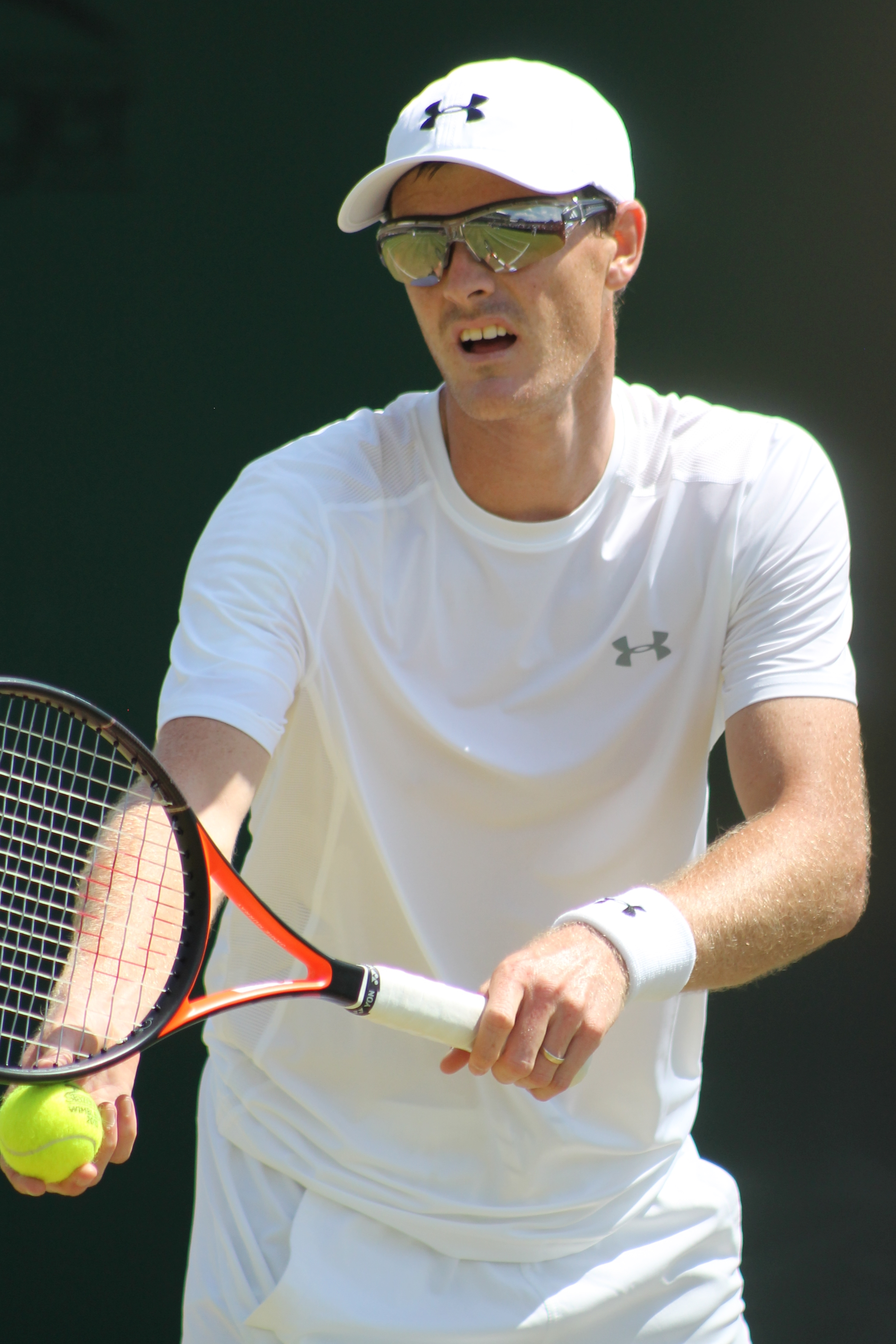 Murray J. WM15 (4)